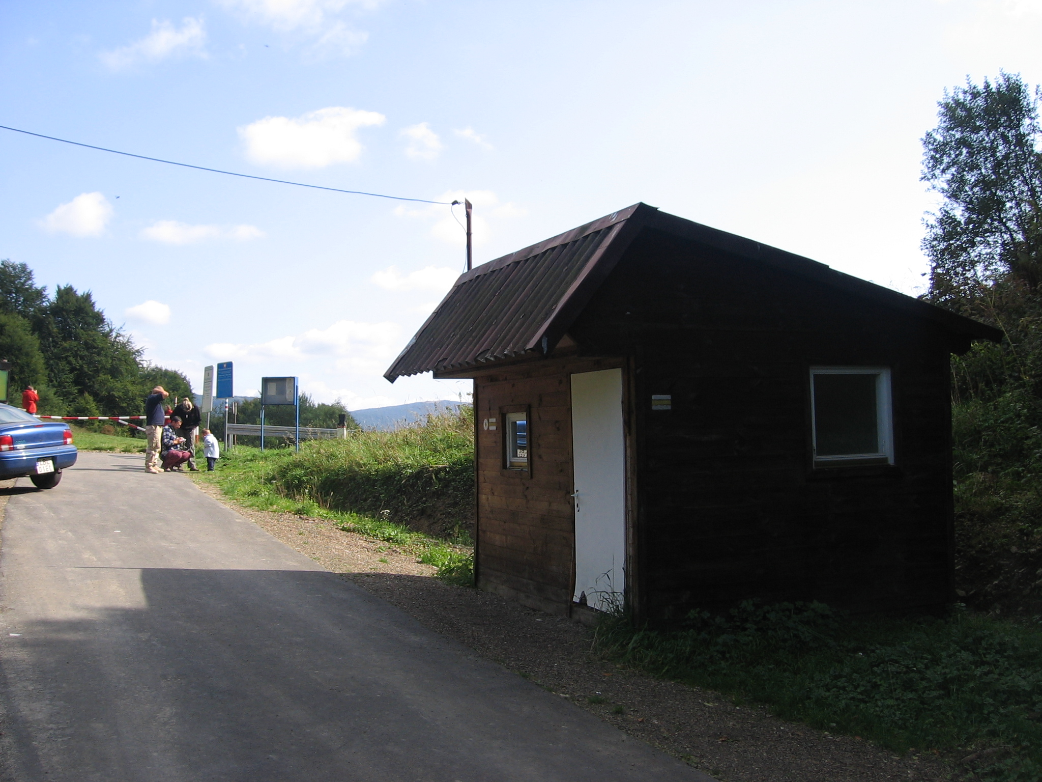 Nad Roztokami pass in Bieszczady mountains - border guards' cabin. Tehere was a telephone and a cash machine (?) inside Przełęcz nad Roztokami Górnymi - budka strażnicza. W środku był telefon i kasa fiskalna